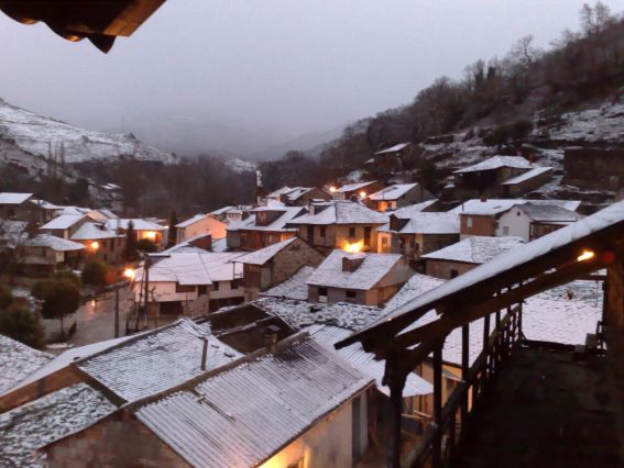 San Clemente de Valdueza nevada.